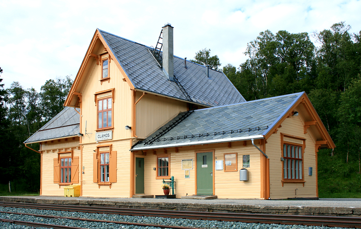 Glåmos stasjon, Rørosbanen. Freda.